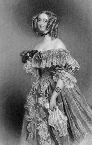 Ann Trevor